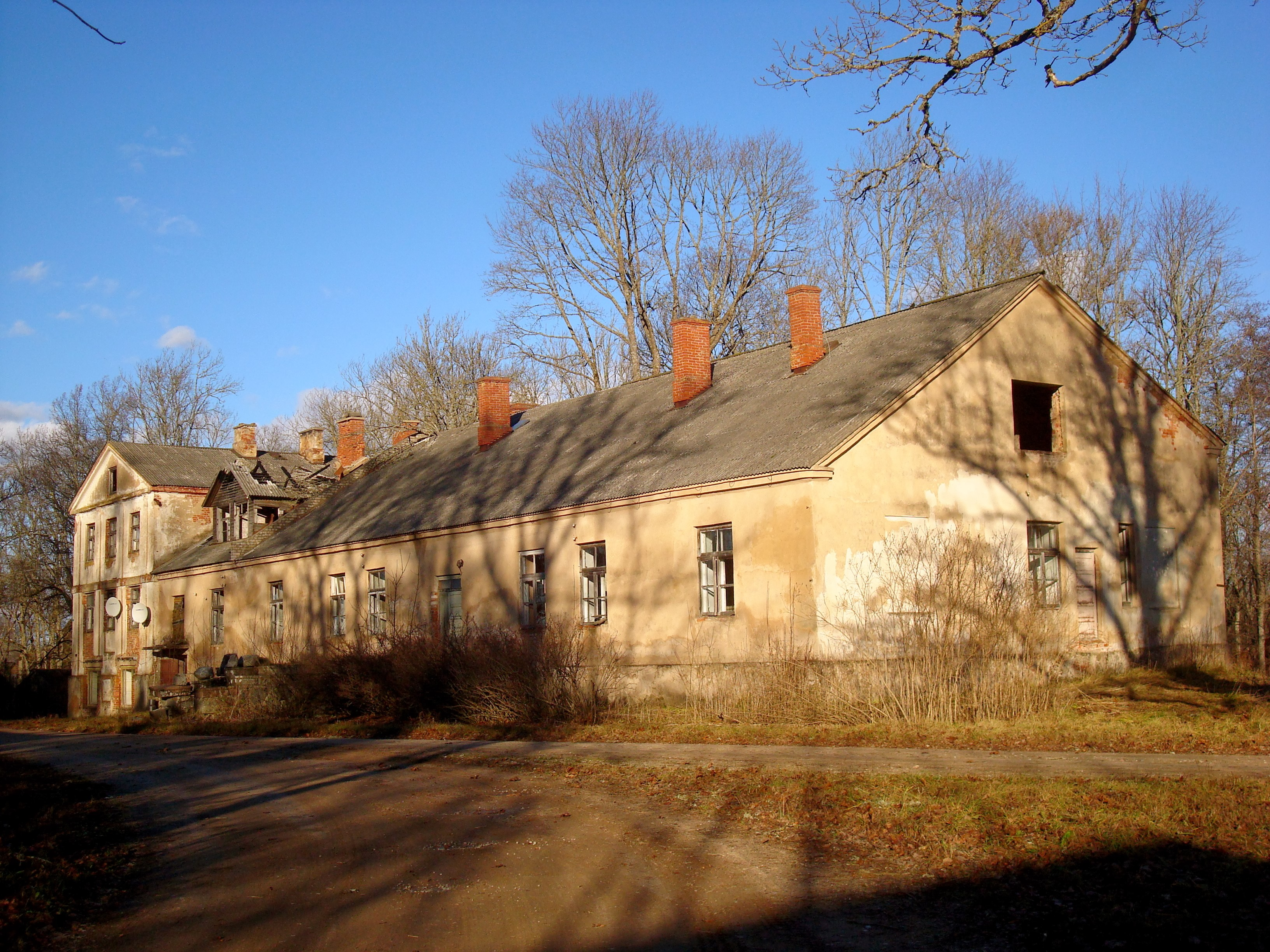 Arakstes muiža /Arakste manor